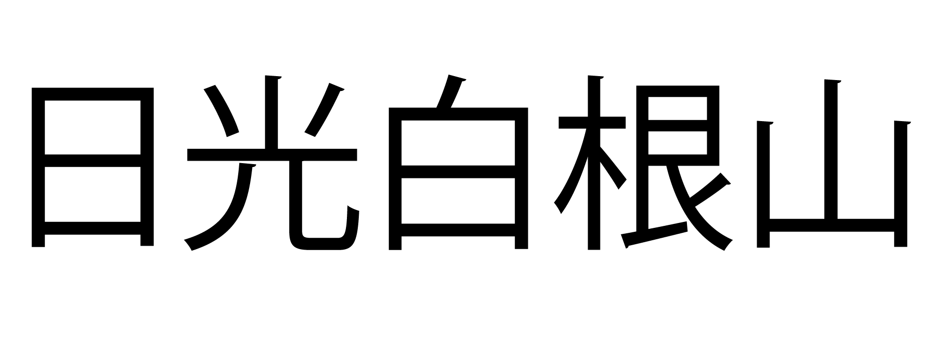 奥白根の山